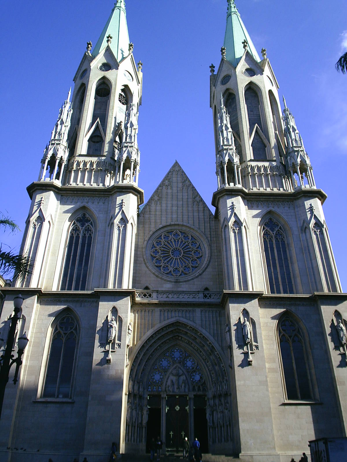 Catedral metropolitana de São Paulo. Fotografia tirada por User:Gaf.arq. São Paulo's metropolitan cathedral. Photo taken by User:Gaf.arq.